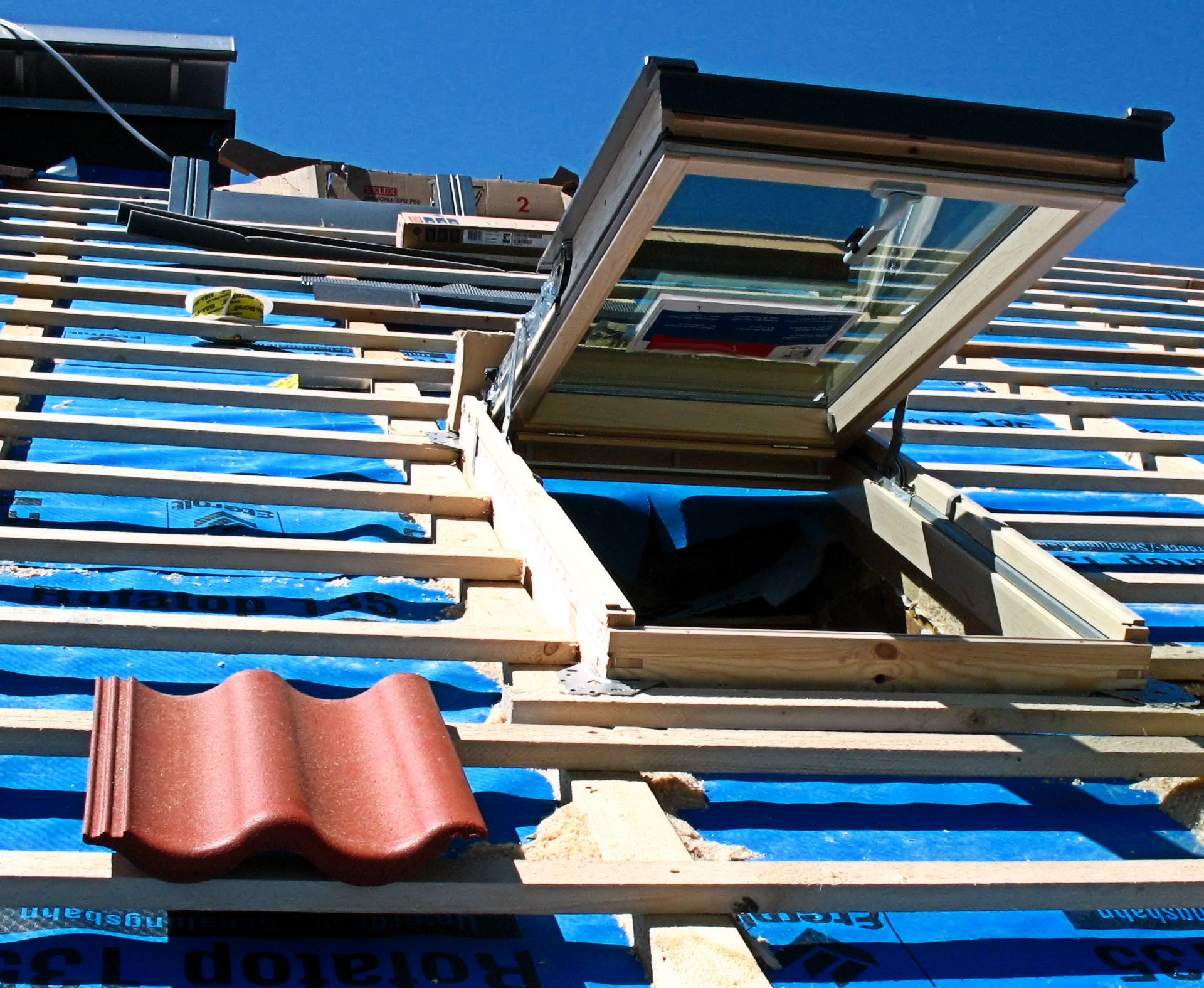 Einzelner Dachstein, Modell "Harzer Pfanne" auf Dachlattung